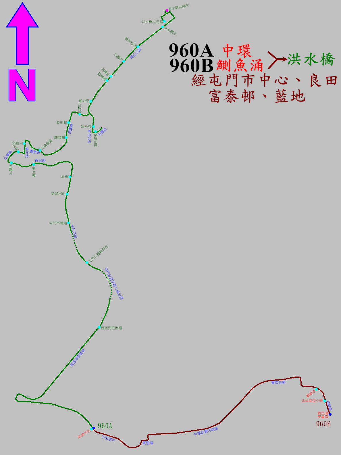 中文（香港）: 過海隧巴960A及960B線的走線圖